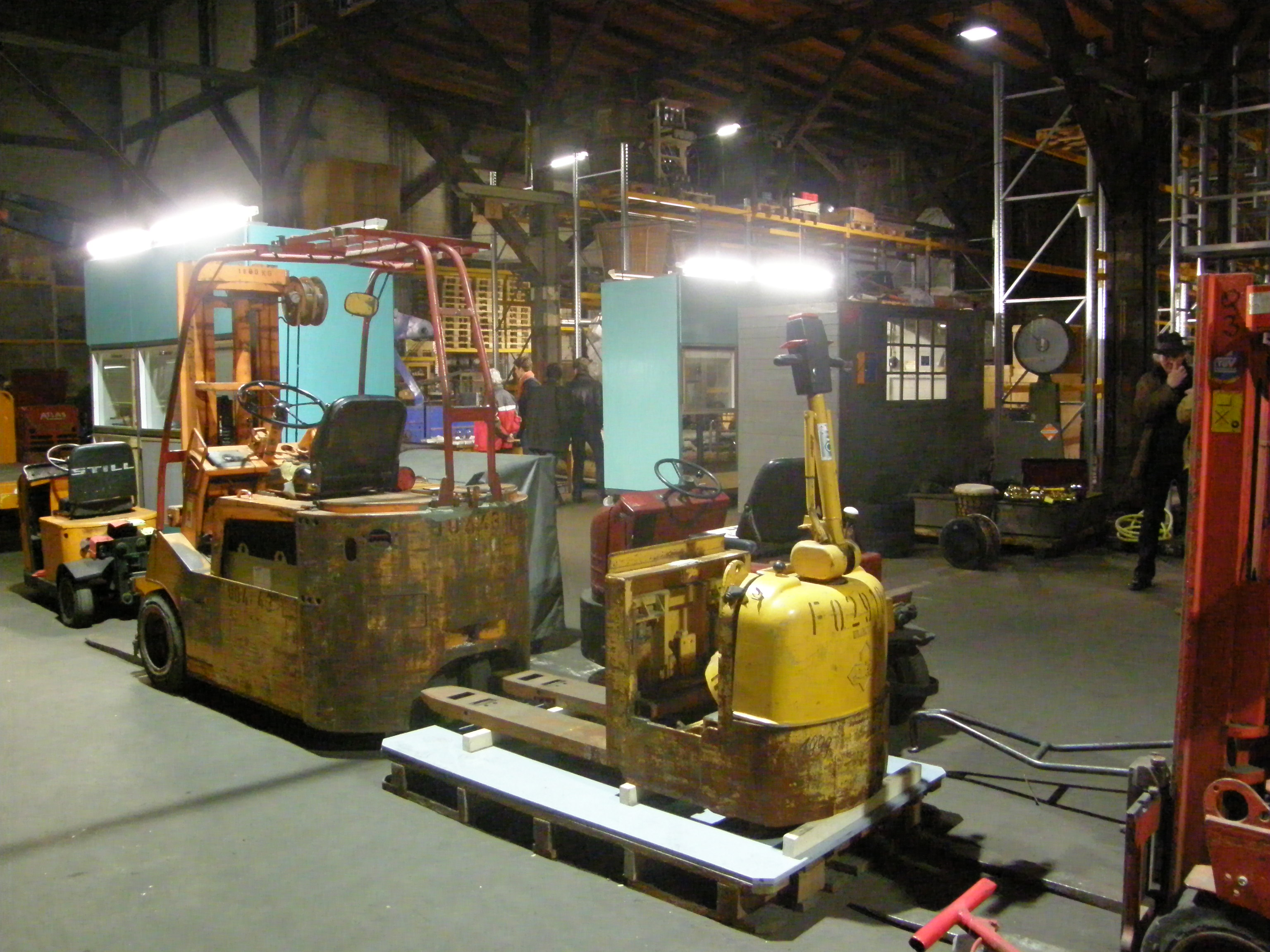 Ausstellung im Hafenmuseum Hamburg Australiastraße Schuppen 50a Hansahafen Bremer Kai